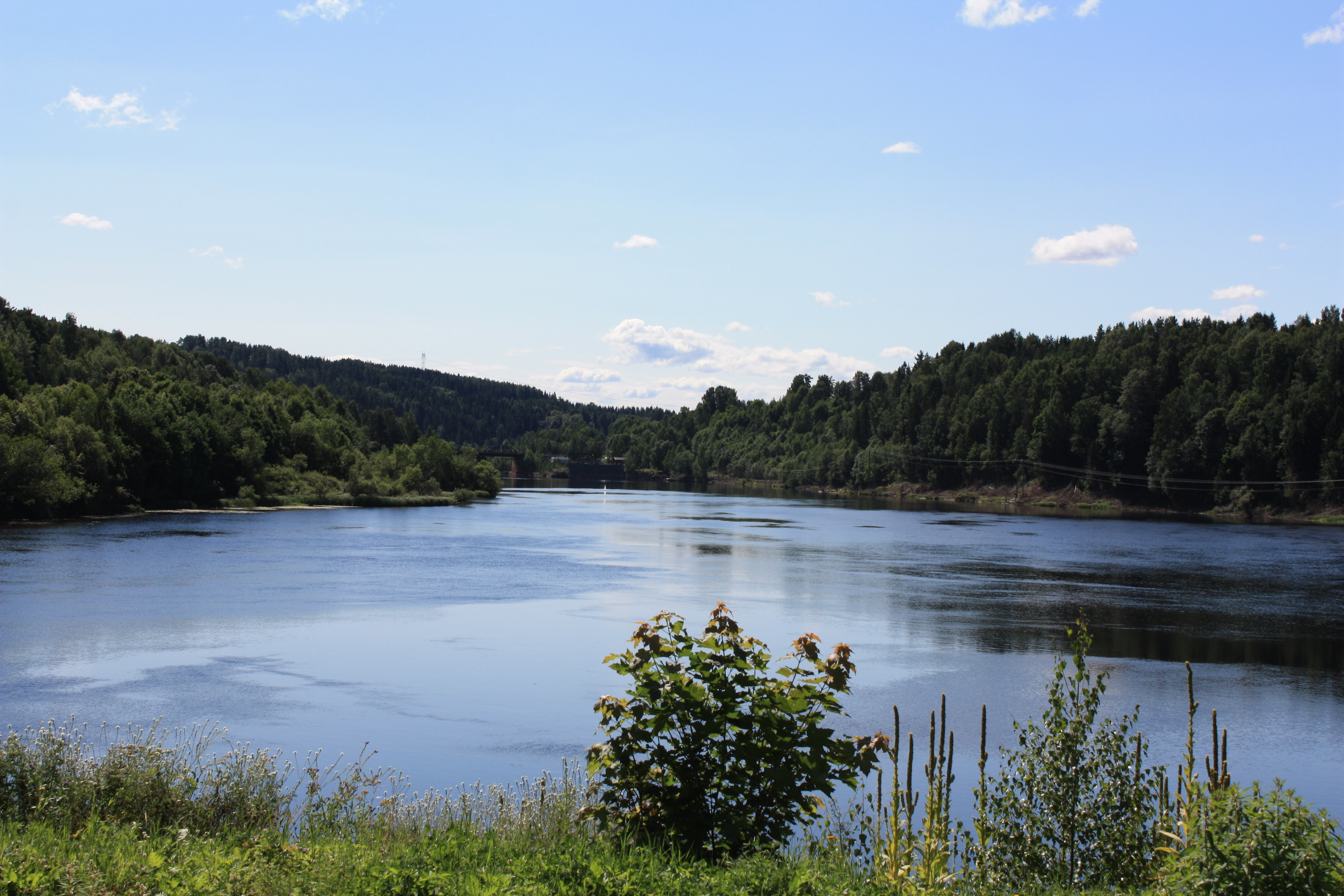 Utsikt sørover Drammenselva på Åmot i Modum.